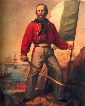 Garibaldi sbarca a Marsala, dipinto di Gerolamo Induno